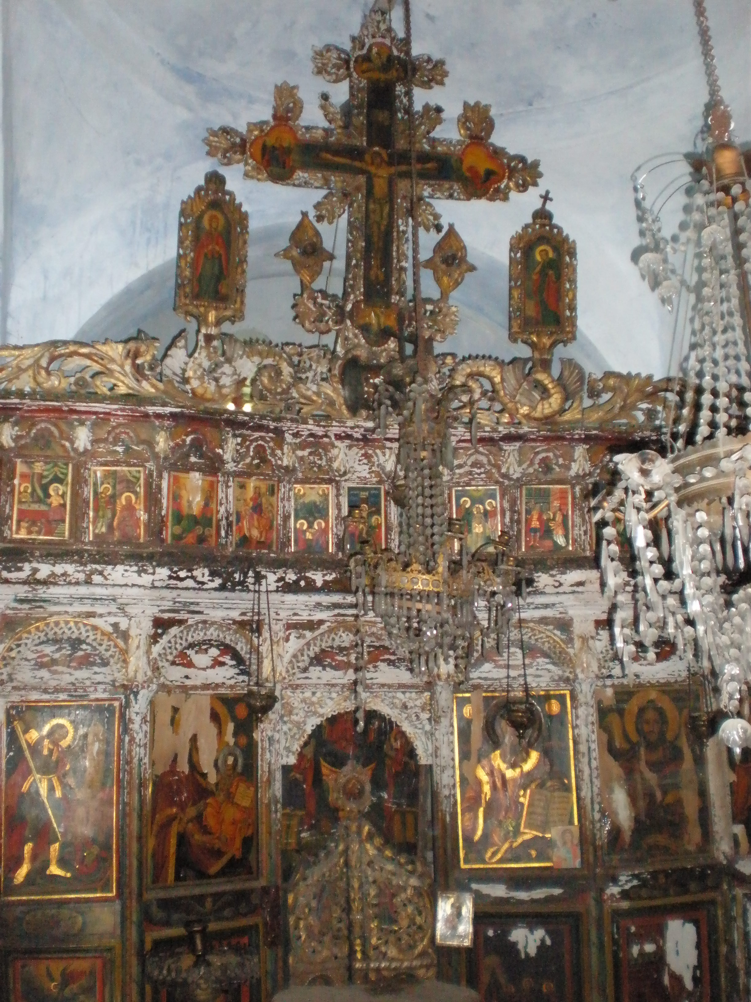 Иконостасот на црквата Свети Димитрија во Волковија